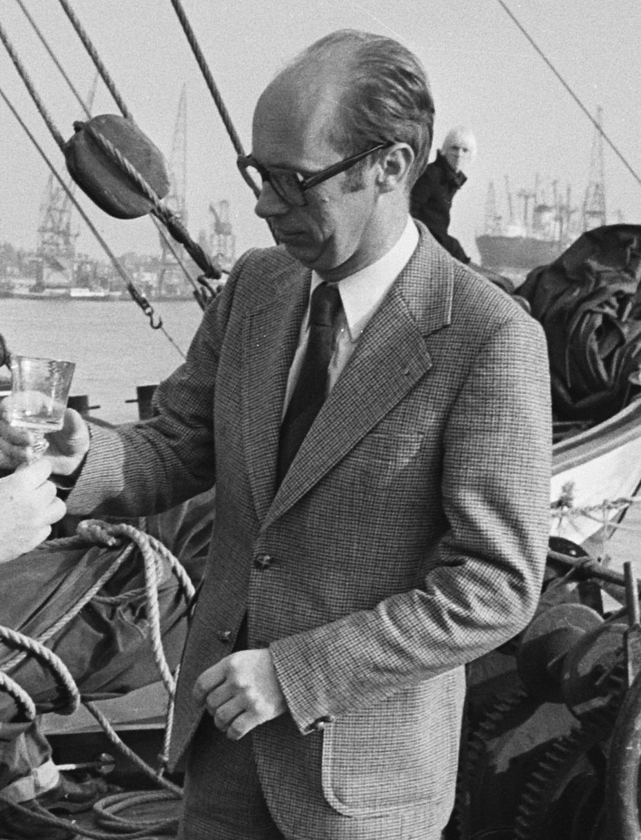 Wethouder Cees Goekoop en burgemeester Jan Pastoor in Amsterdam t.g.v. Workumse binnenvaartklippers